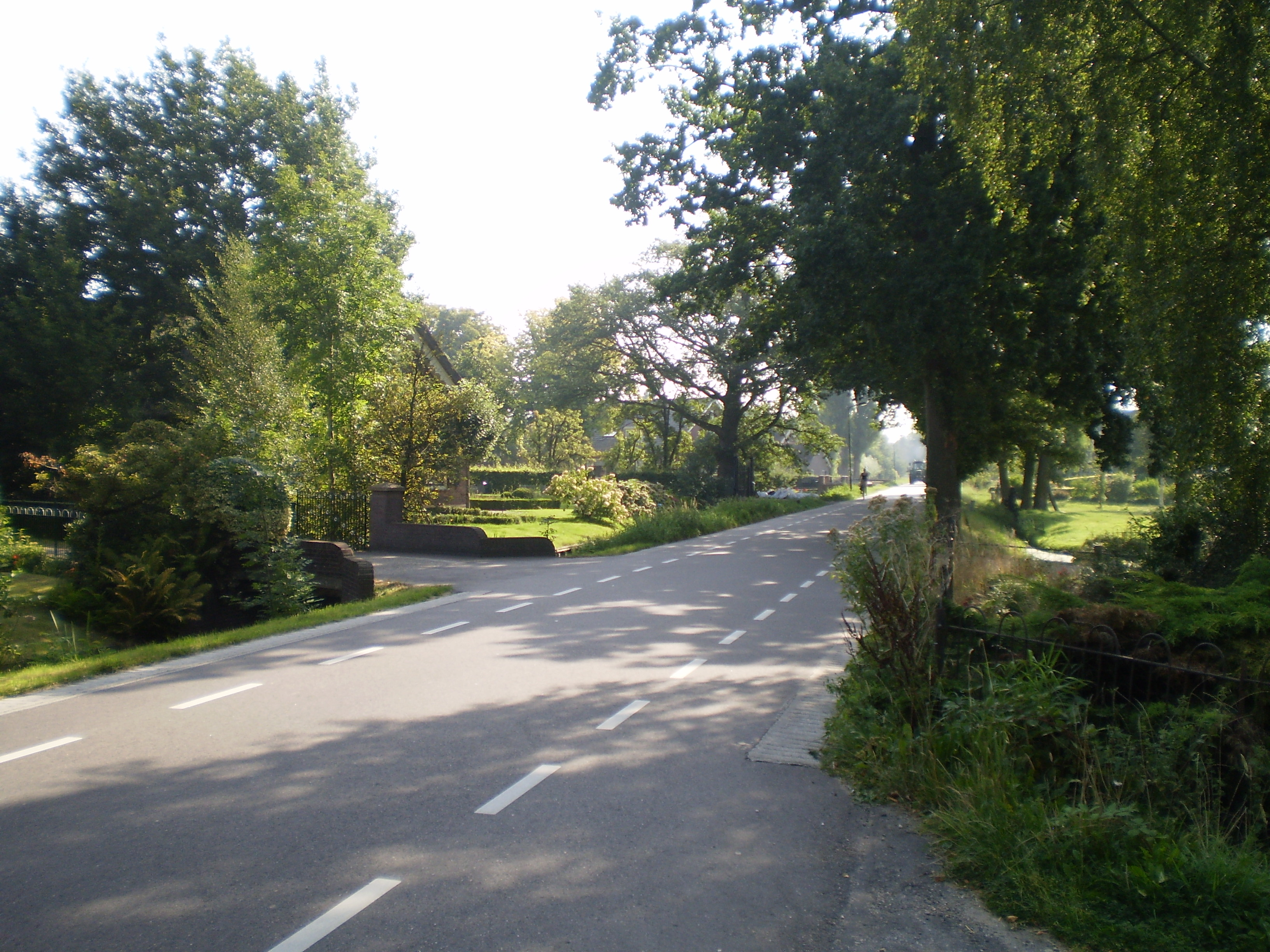 Achttjinhoven by Westbroek